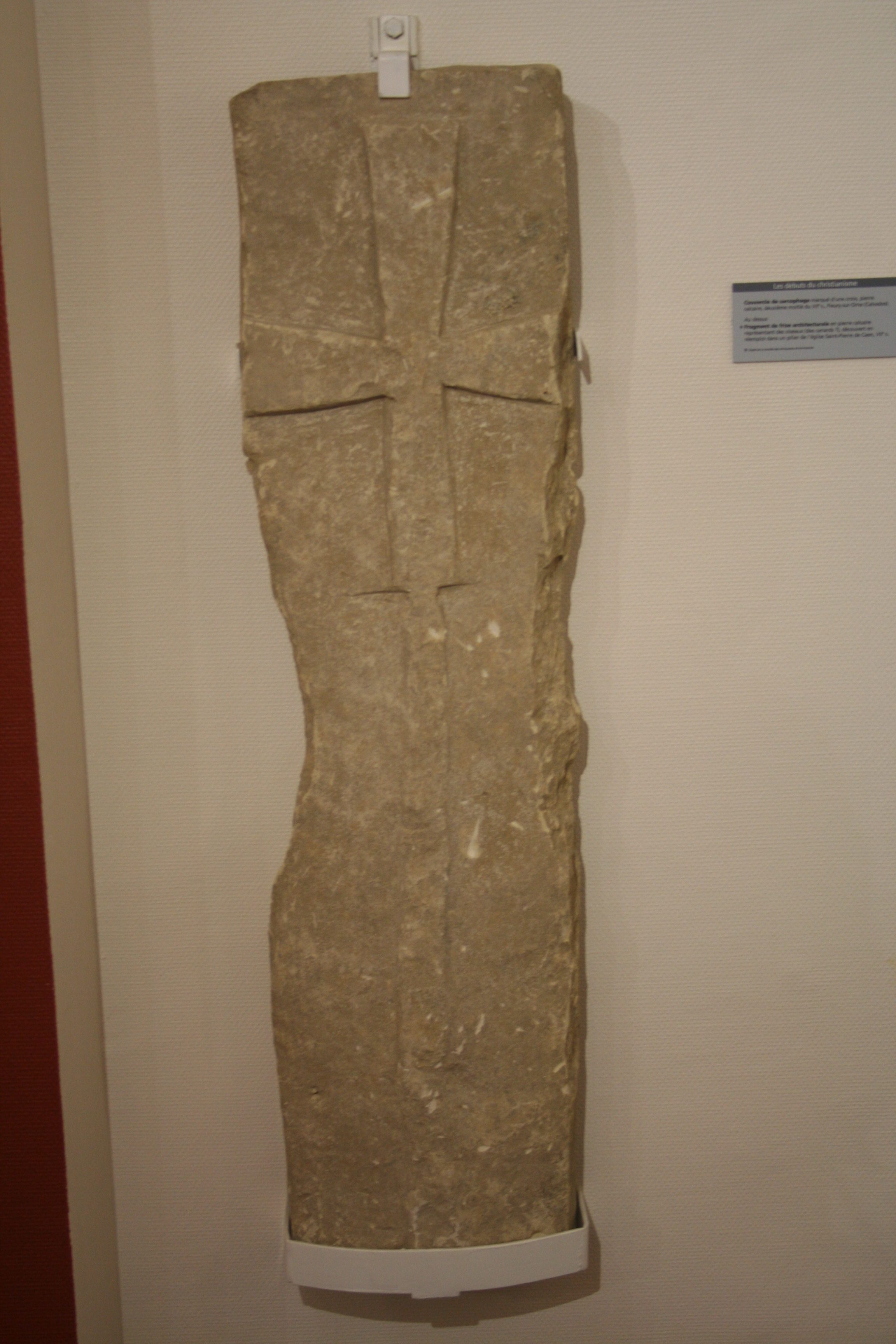 couvercle de sarcophage christianisé, Fleury s/Orne